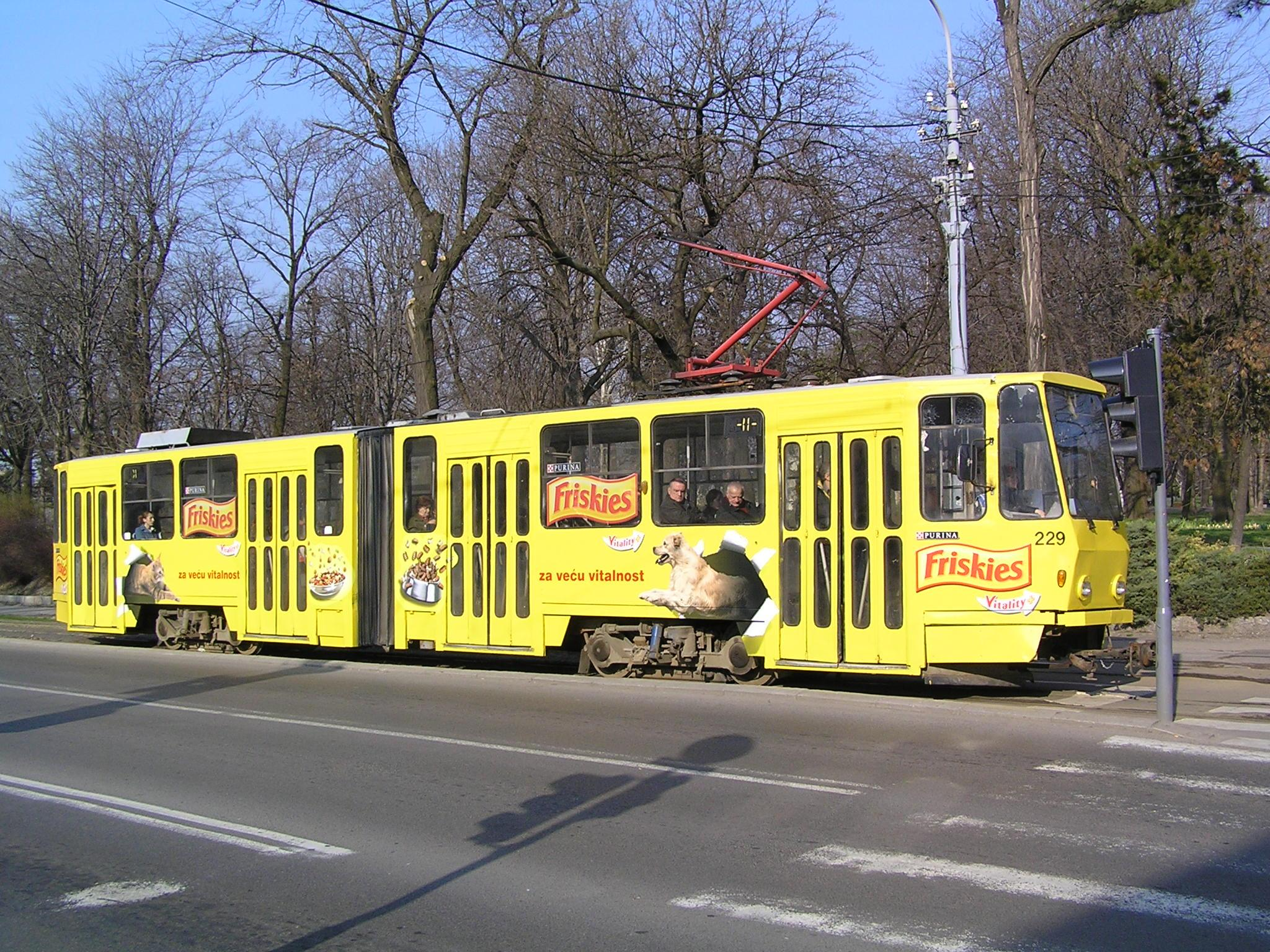 Tram in Belgrade